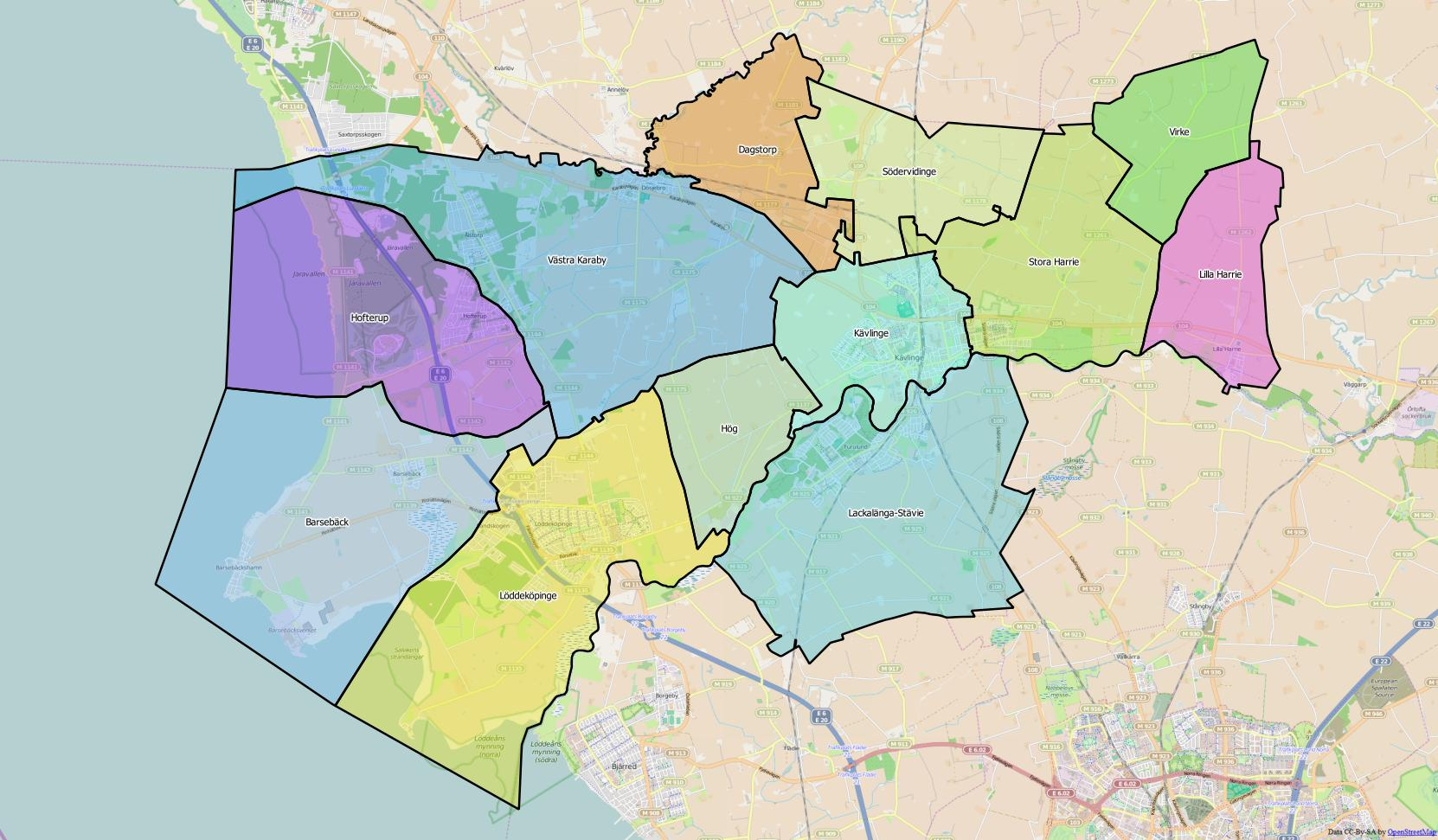 Distriktsindelningen i kommunen.